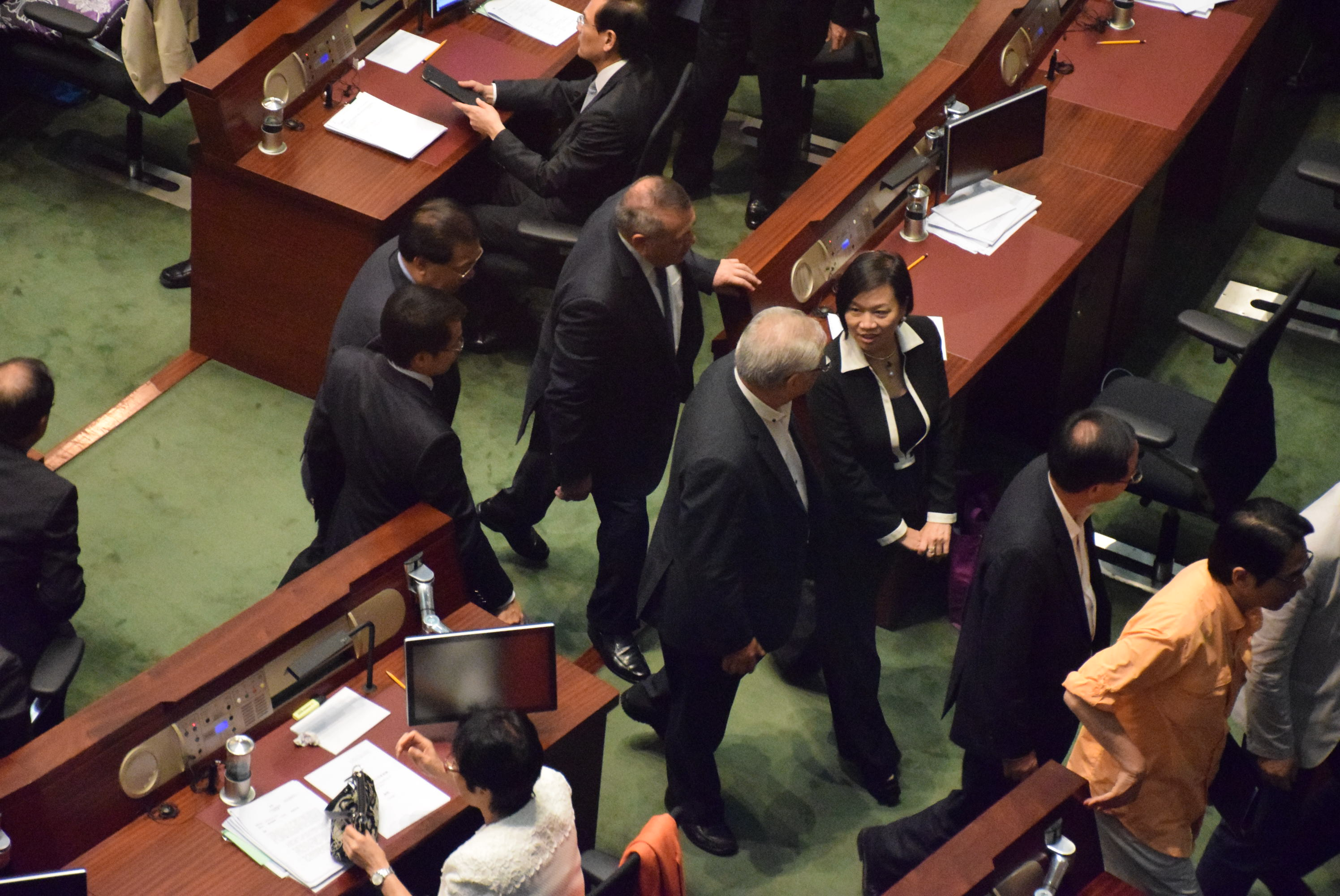 中文（香港）: 30多位建制派立法會議員在表決前突然離席。（美國之音 湯惠芸攝)